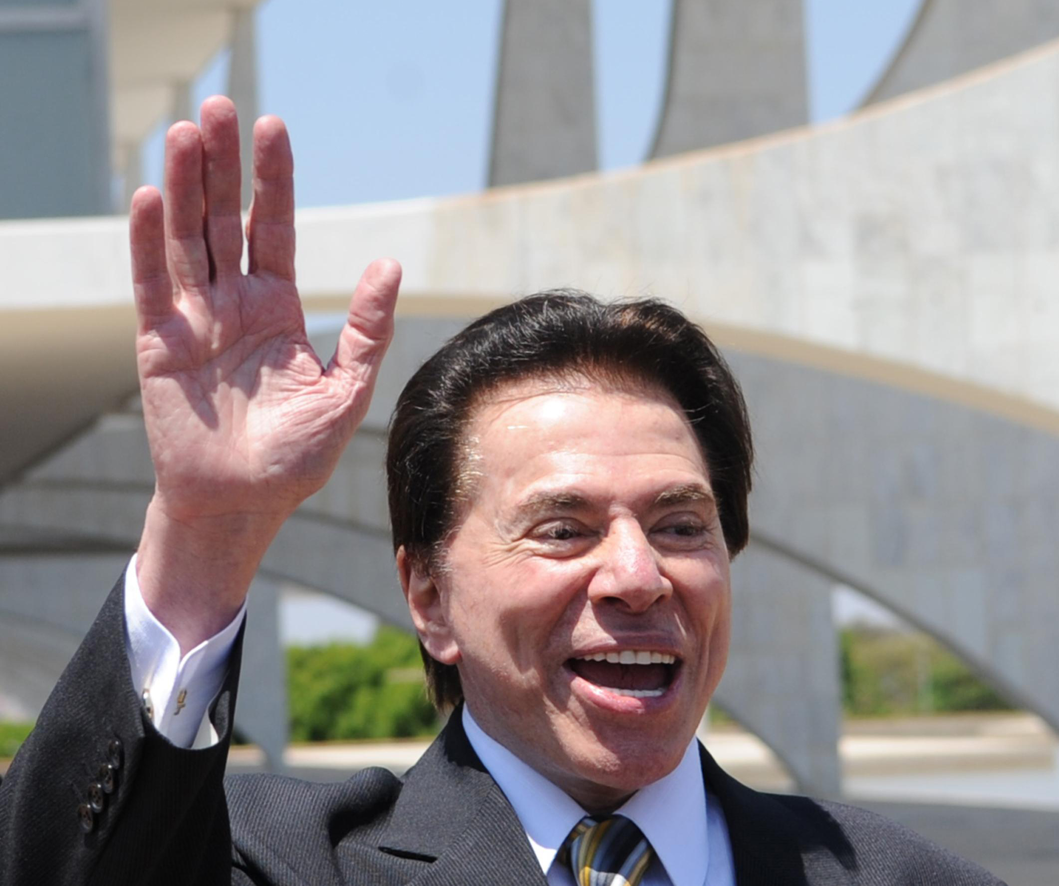 Brasília - O empresário Silvio Santos deixa o Palácio do Planalto após reunião com o presidente Luiz Inácio Lula da Silva (Antonio Cruz/ABr)